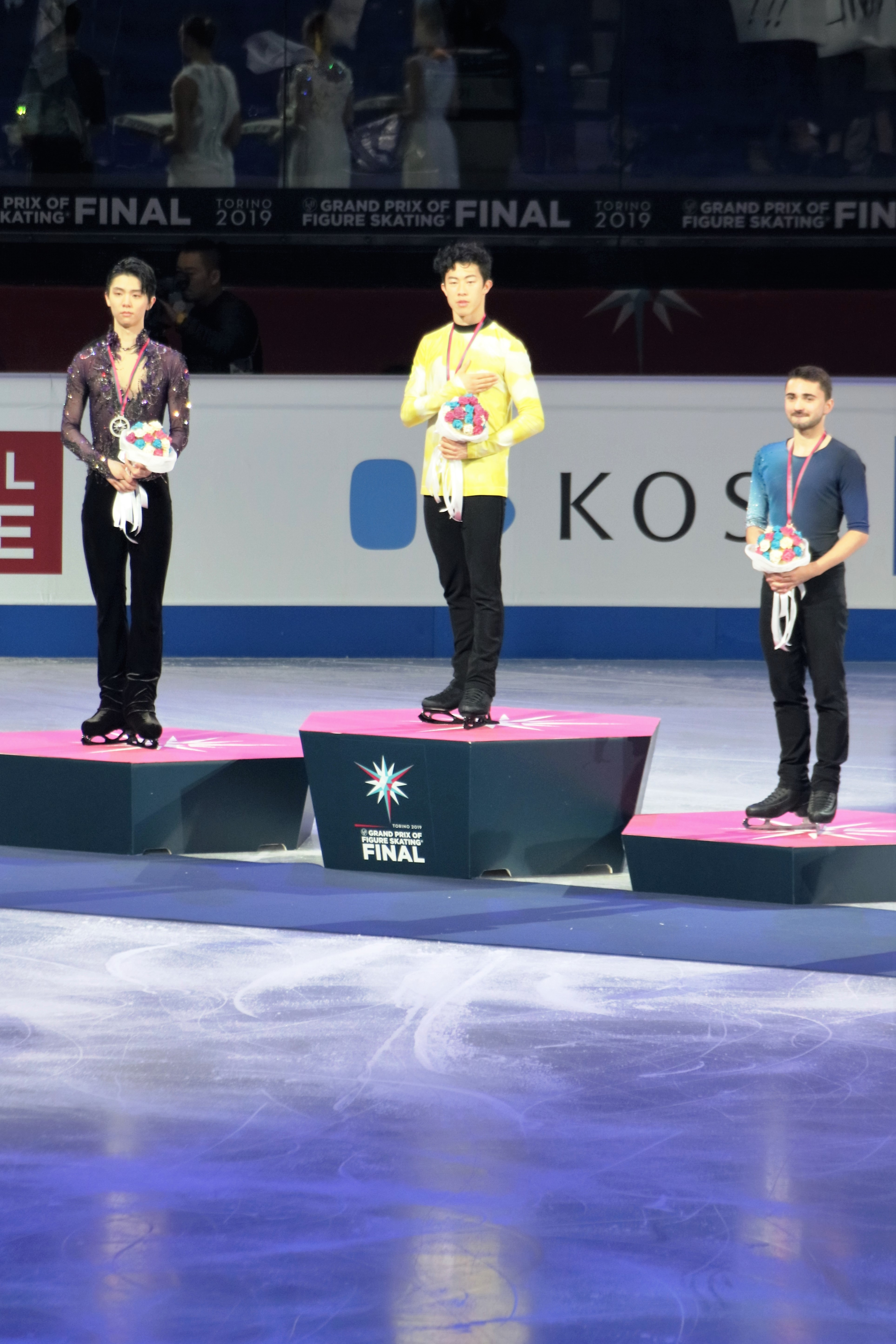 Церемония награждения в мужском одиночном катании на финале Гран-при 2019-2020